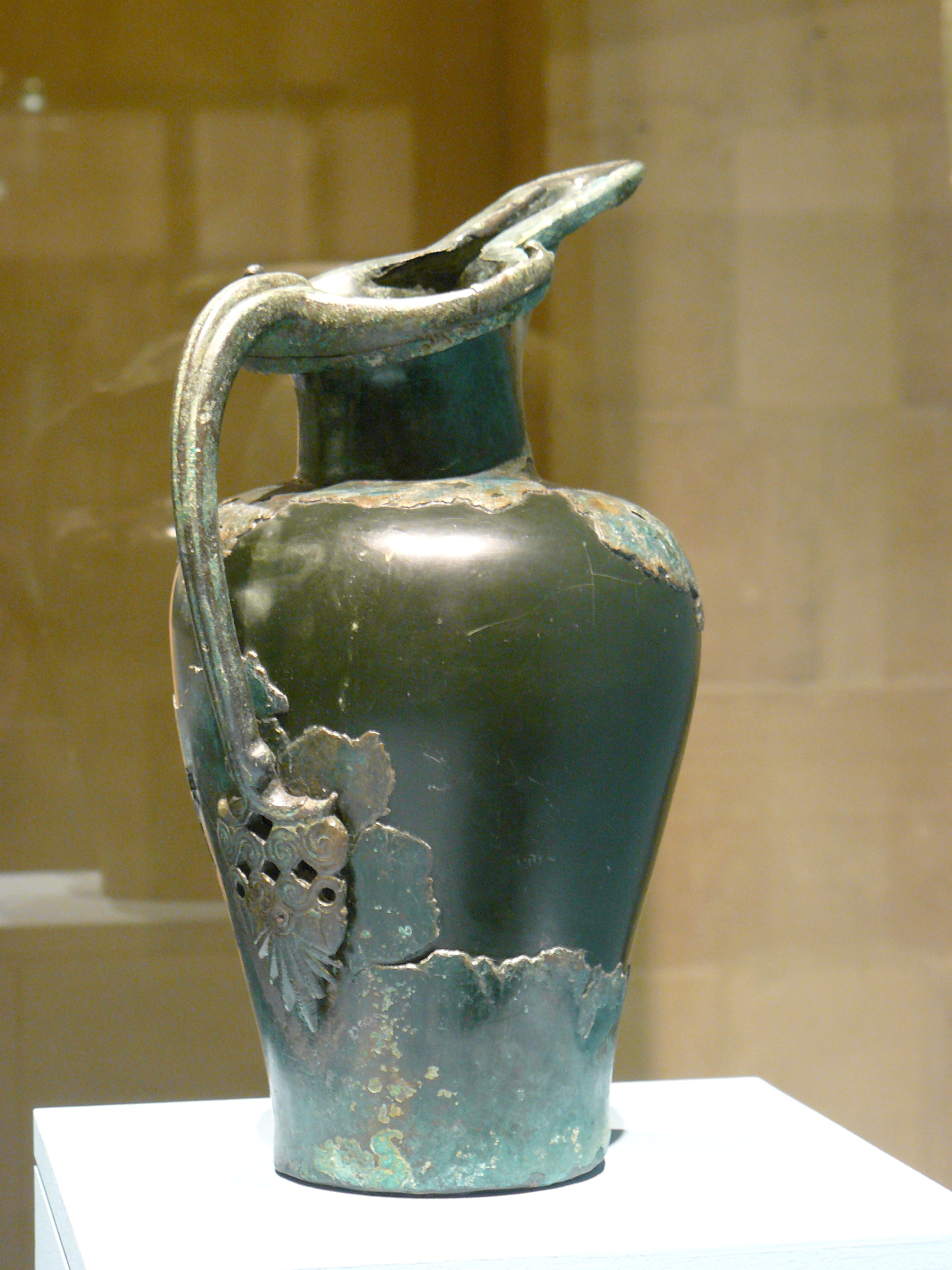 Oenochoé en bronze (restauré) d'importation étrusque. Mobilier funéraire culture de Golasecca, période III, vers 450 av.JC - hauteur environ 30 cm - Musée d"archéologie nationale de Saint-Germain-en-Laye